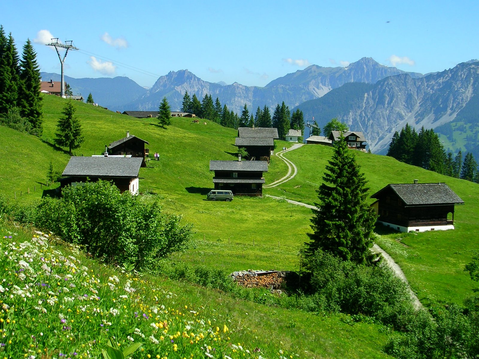 Maisäß Matschwitz im Sommer